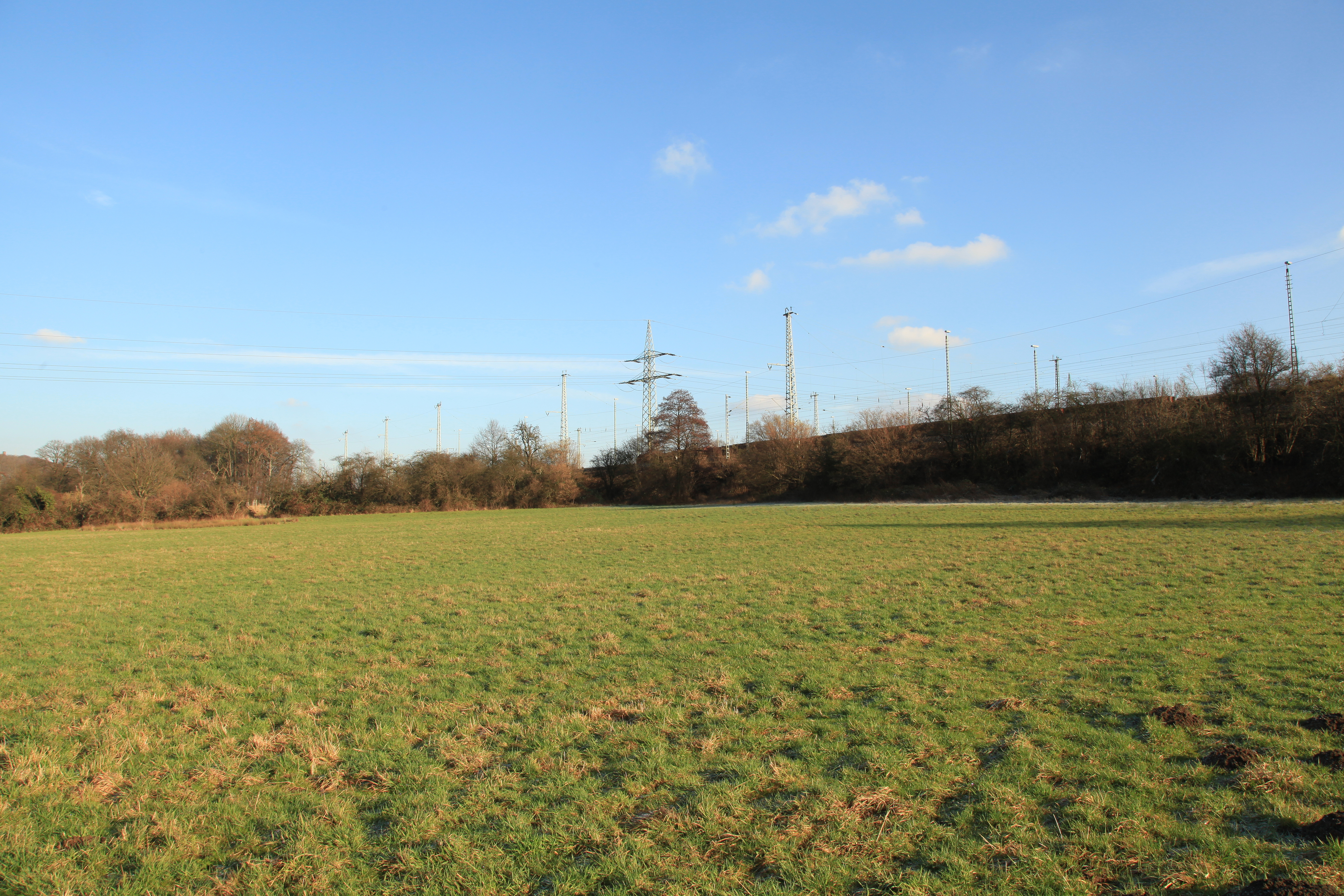 Hagen-Vorhalle: Blick vom namenlosen Wirtschaftsweg südwestlich des Hofs Niederste Hülsberg über eine Wiese in Richtung Nordosten, rechts der Bahndamm im Vorfeld des Rangierbahnhofs Vorhalle, ganz links im Hintergrund der Kaisberg; abgebildeter Bereich (bis zum Bahndamm) gelegen im Landschaftsschutzgebiet „Ruhraue/Auf der Bleiche“